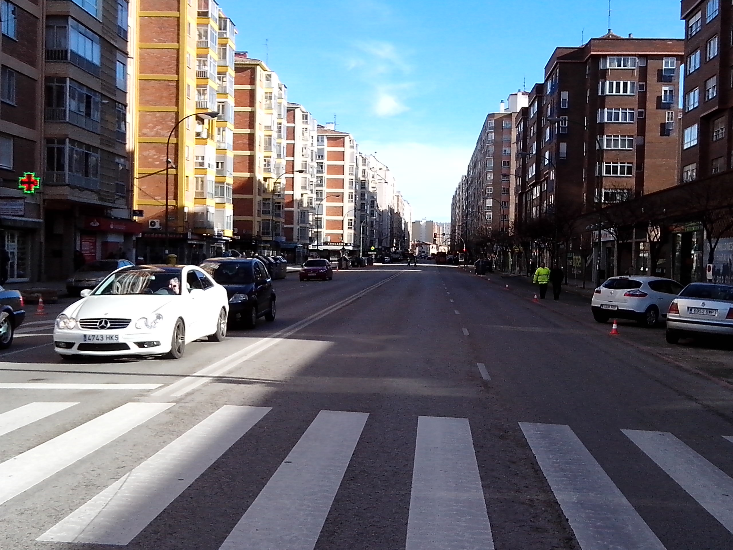 Calle Vitoria, Gamonal, Burgos. Día anterior a que empezasen las obras del bulevar, que provocaron disturbios.